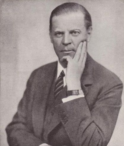 Carl Juhlin-Dannfelt